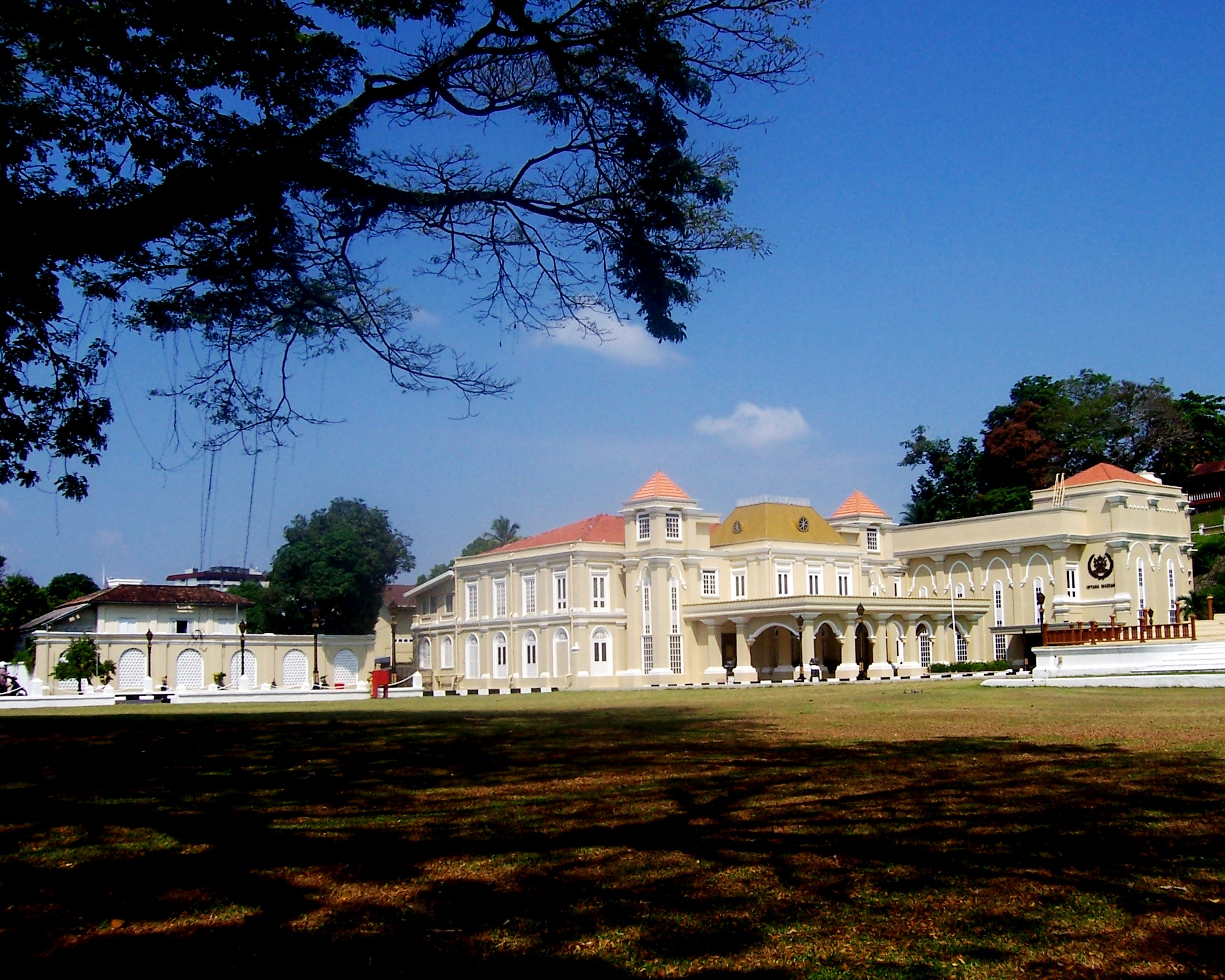 Maziah Palace, Kuala Terengganu